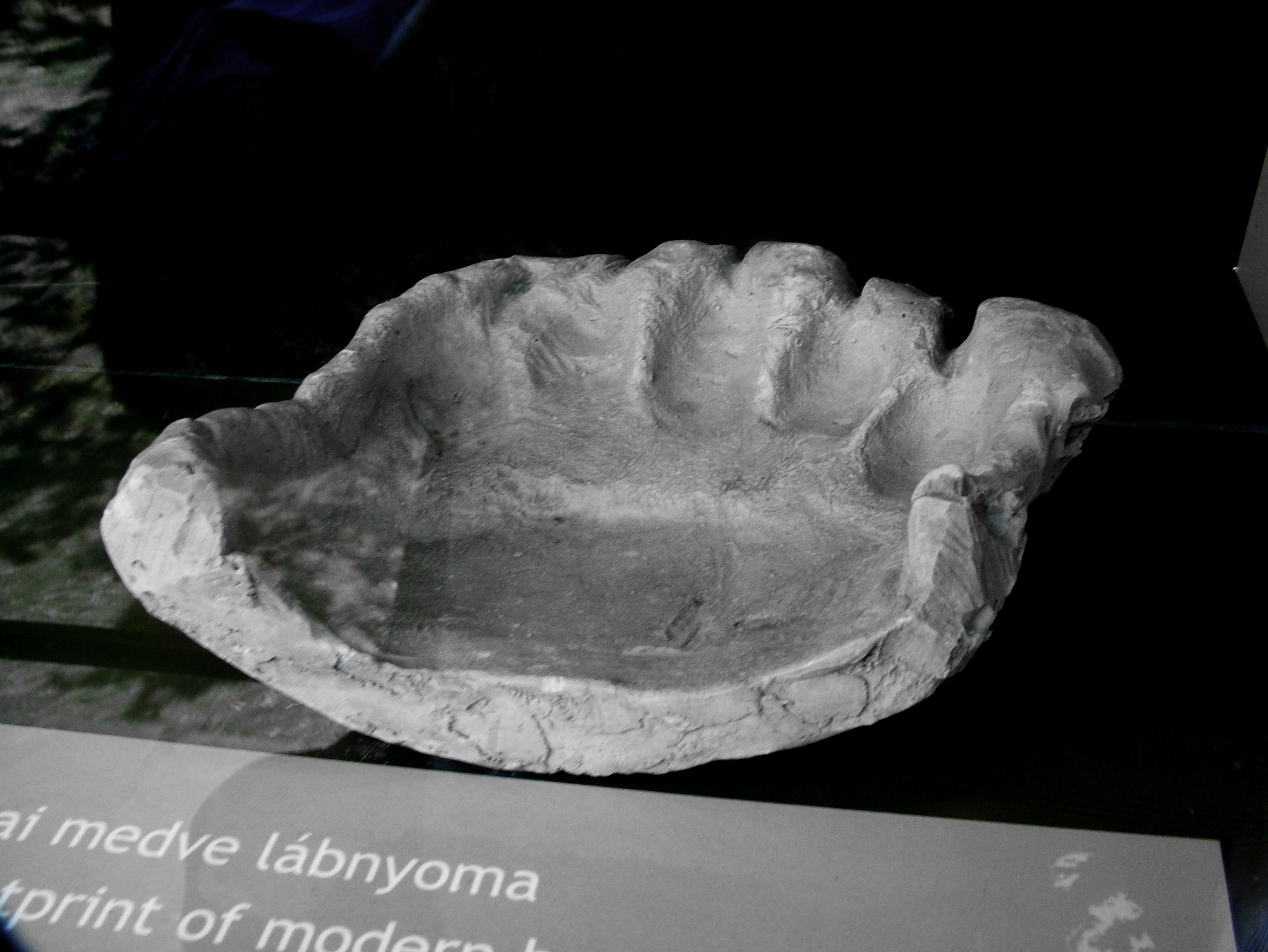 Őskőkori medvenyom (Vértesszőlős Őstelep)